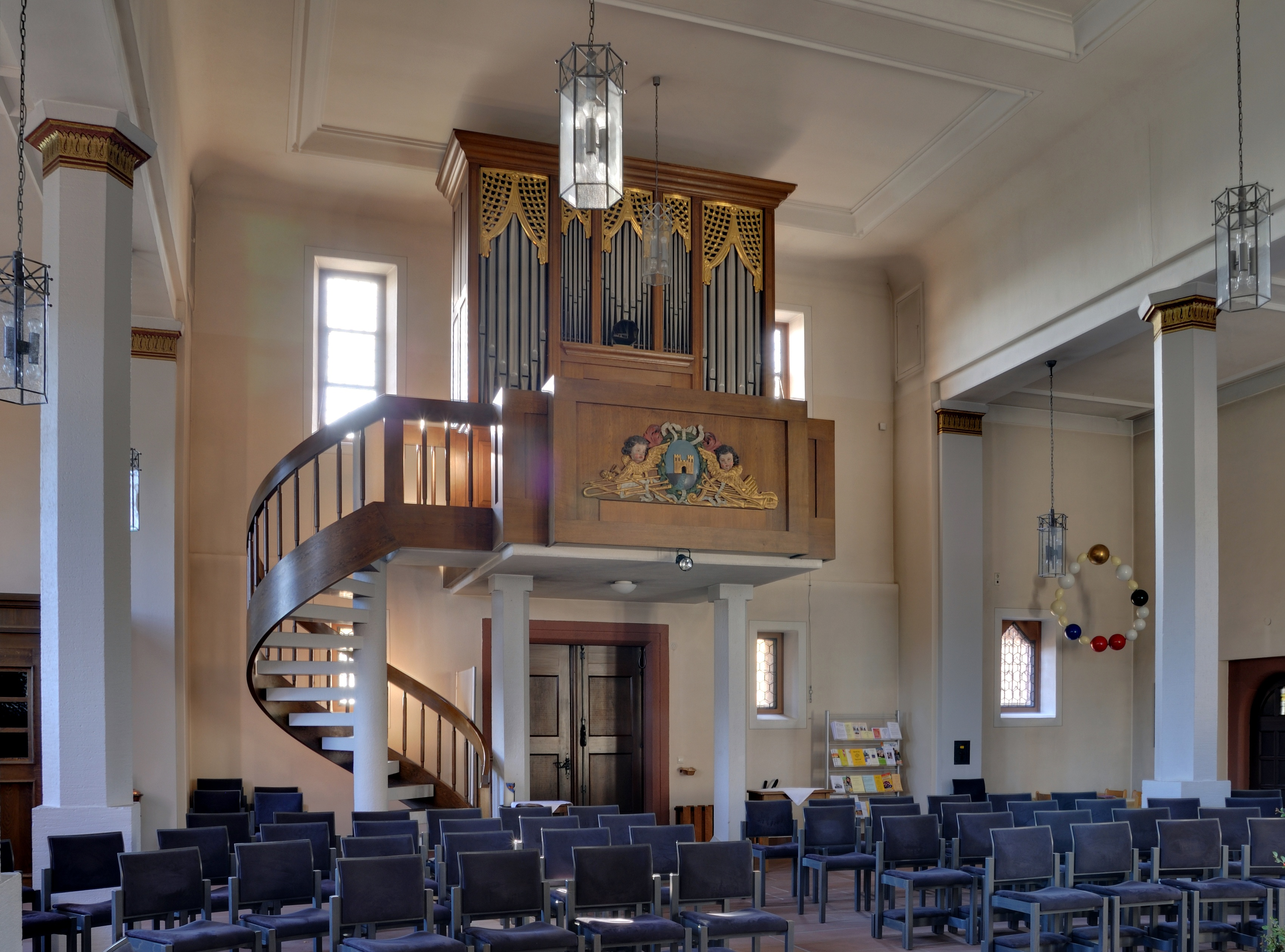 Rheinfelden-Warmbach: Orgel der Galluskirche